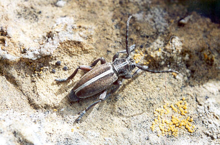 Dorcadion aries